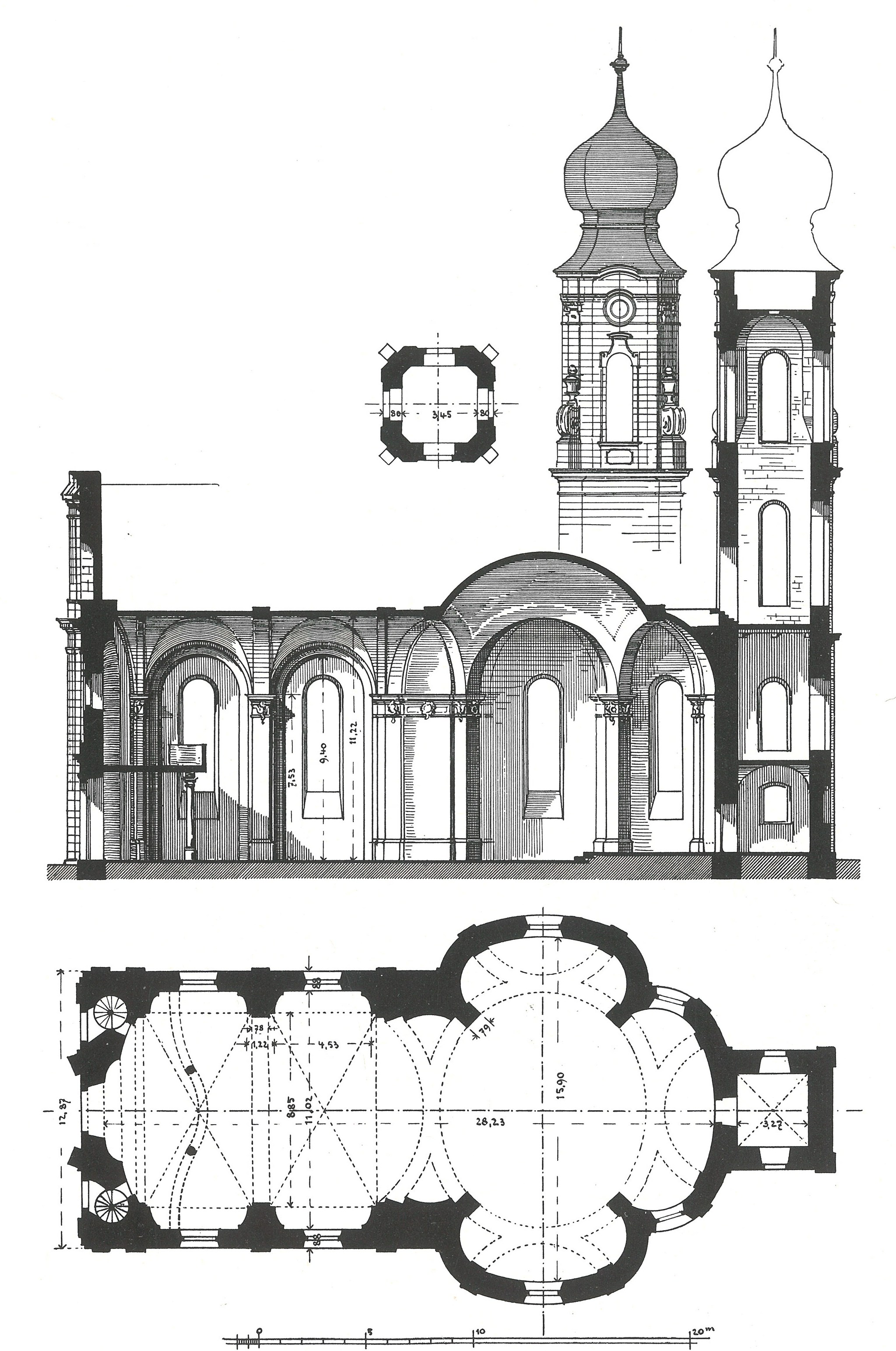 Karlinger, Hans: Die Kunstdenkmäler. S. 81. Grund-, Aufriss Dreifaltigkeitskirche Gaibach.